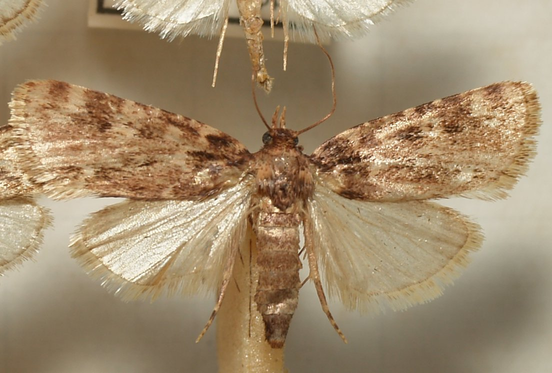 Aglossa caprealis